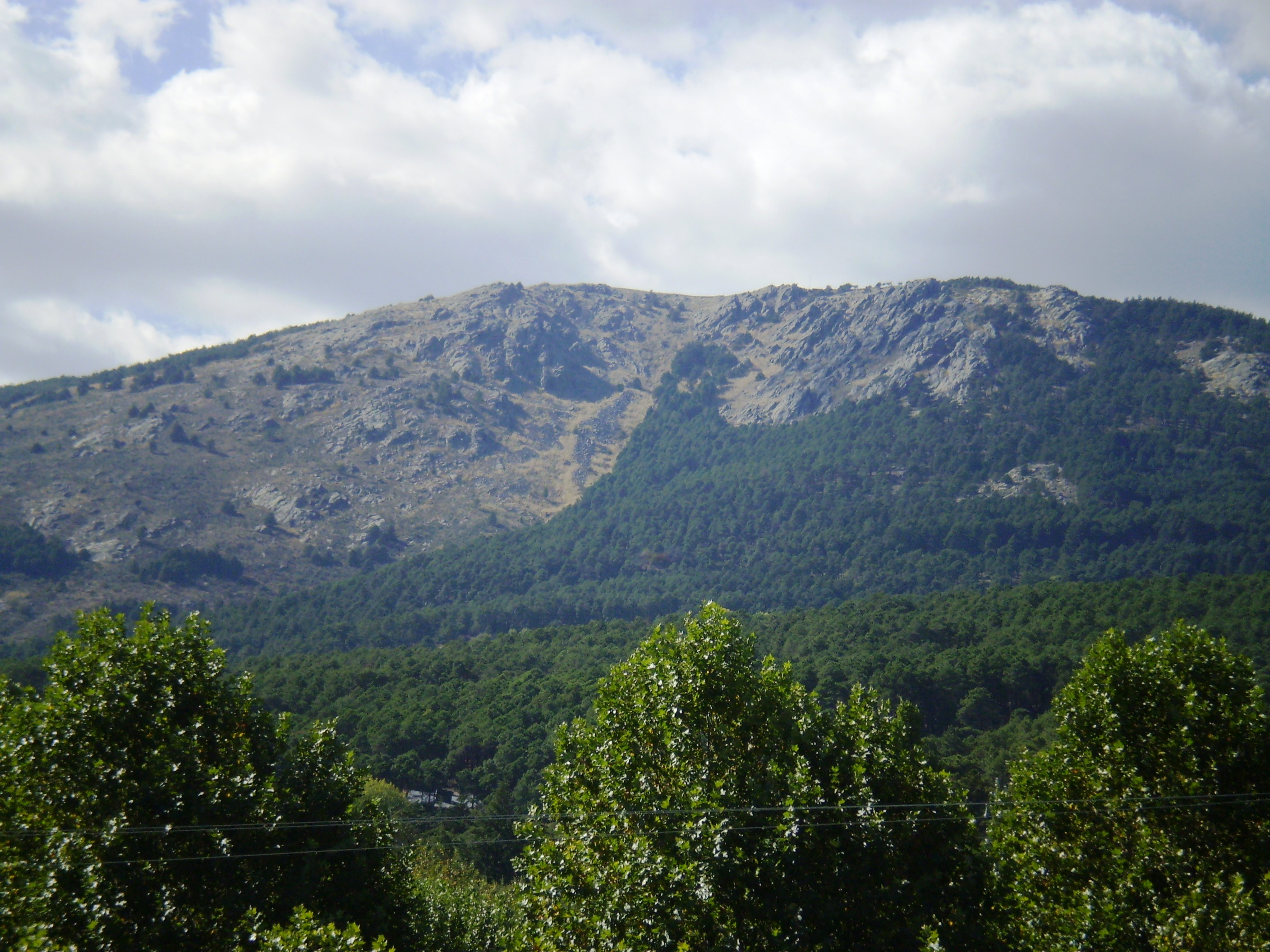 Paraje Pintoresco del Pinar de Abantos y Zona de La Herrería, San Lorenzo de El Escorial, Sierra de Guadarrama, Community of Madrid, Spain